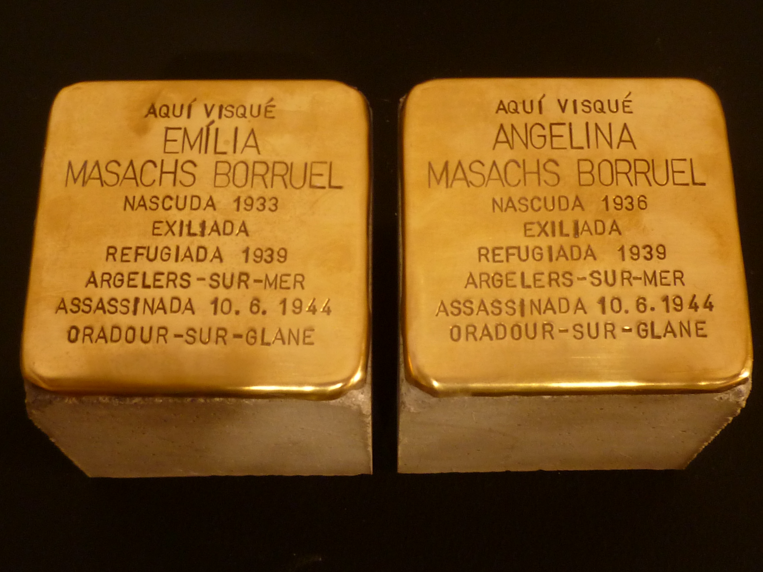 Les dues llambordes "stolpersteine" en homenatge a les germanes Emília i Angelina Masachs Borruel. Sabadell, maig de 2018. Autor: Genís Ribé (MHS).